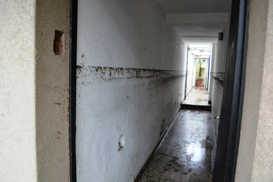 Estas fotos las saqué con la primera luz del día después, pero luego de ver el desastre, colgué la cámara y, como la gran mayoría, nos pusimos a trabajar en el rescate con los amigos, con las pocas herramientas que disponíamos. Sin duda, lo que vimos después fue mucho peor, pero ya no era tiempo de fotos.